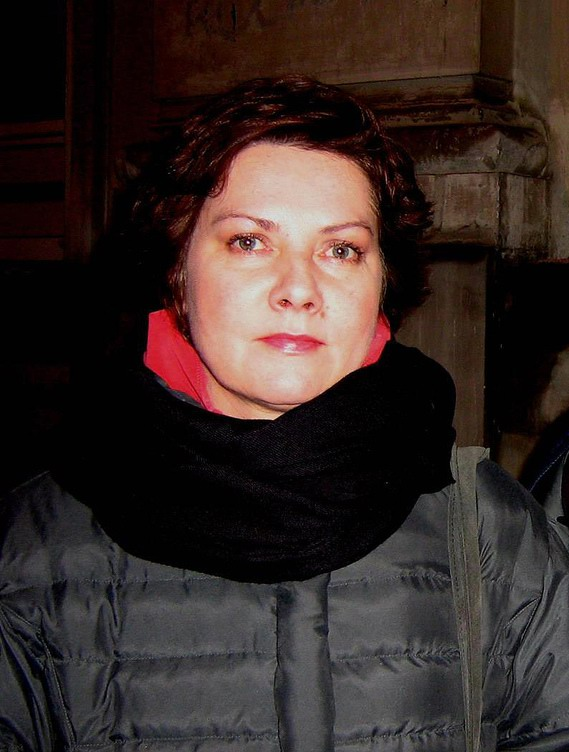 Agnieszka Kotulanka (ur. 26 października 1956 w Warszawie) - polska aktorka filmowa i teatralna.